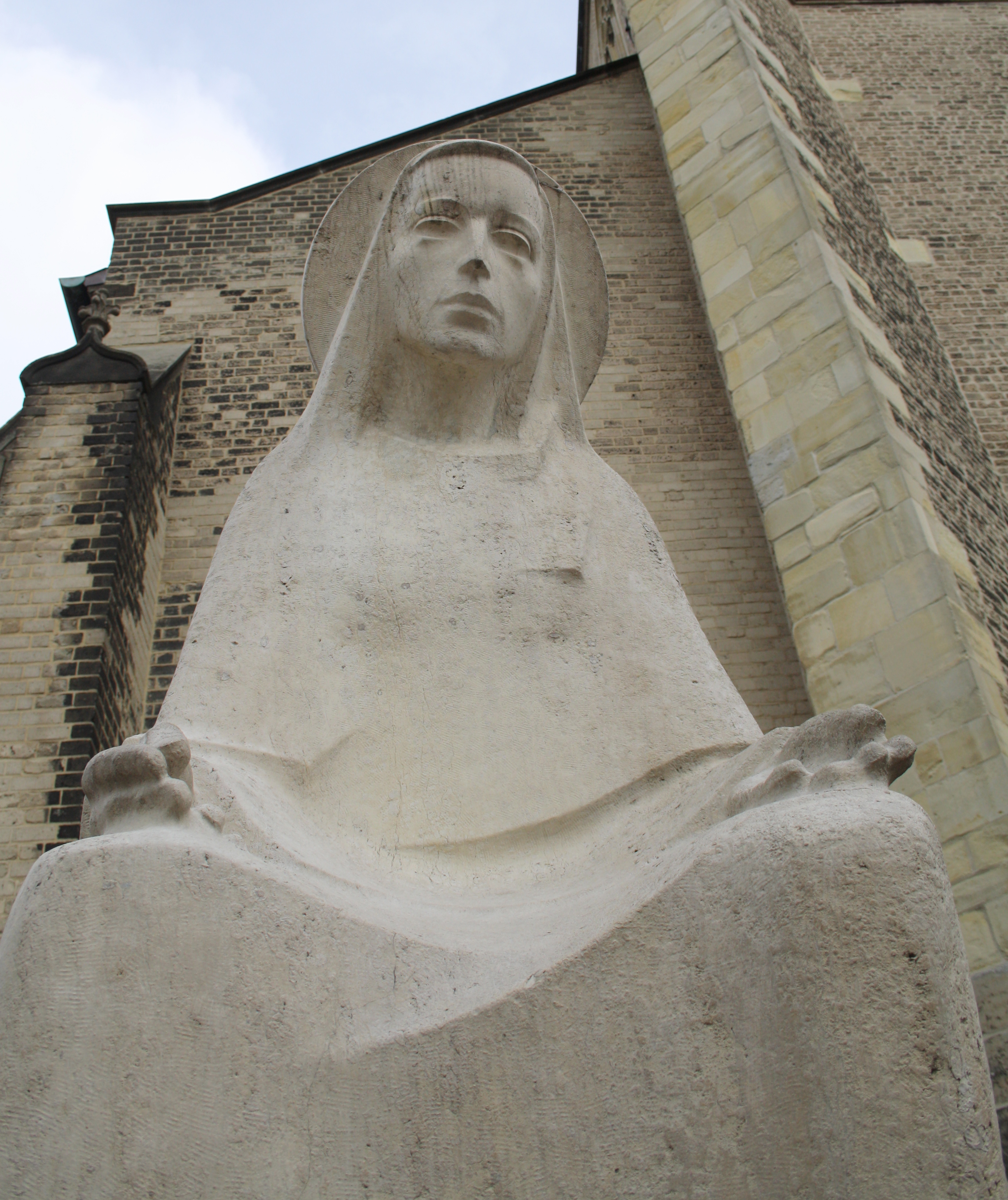 St.-Georg-Kirche, Bocholt. Draußen vor der Kirchturmfassade steht seit März 1957 eine 2,60 m hohe Marienfigur von Wilhelm Hanebal (1905-1982) aus Büderich bei Düsseldorf. Der Schoß der Marienfigur ist leer: der Mutter wurde ihr Sohn genommen - so wie viele Mütter ihre Söhne im Krieg verloren. In notvoller Kriegszeit, im März 1945, wurden die innerstädtischen katholischen Kirchengemeinden dem unbefleckten Herzen Mariä geweiht und die Katholiken hatten gelobt, ein Marien-Standbild in der Stadt zu errichten. Ich habe das Foto gewählt, weil der Heiligenschein wegen der Maserung mit dem Hintergrund verschmilzt. This is a photograph of an architectural monument., no. o